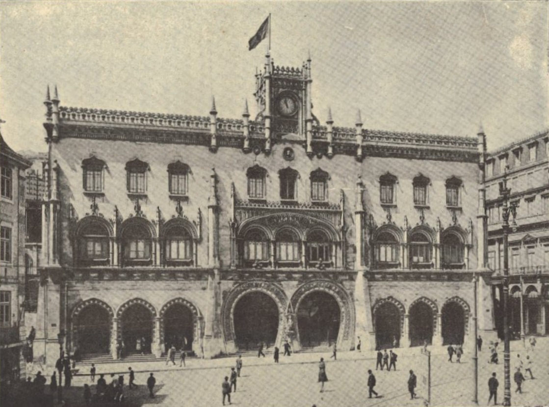 Estação Ferroviária do Rossio, na cidade de Lisboa, em Portugal. Esta imagem foi publicada na Gazeta dos Caminhos de Ferro n.º 1291, de 1 de Outubro de 1941, e digitalizada pela Hemeroteca Municipal de Lisboa.